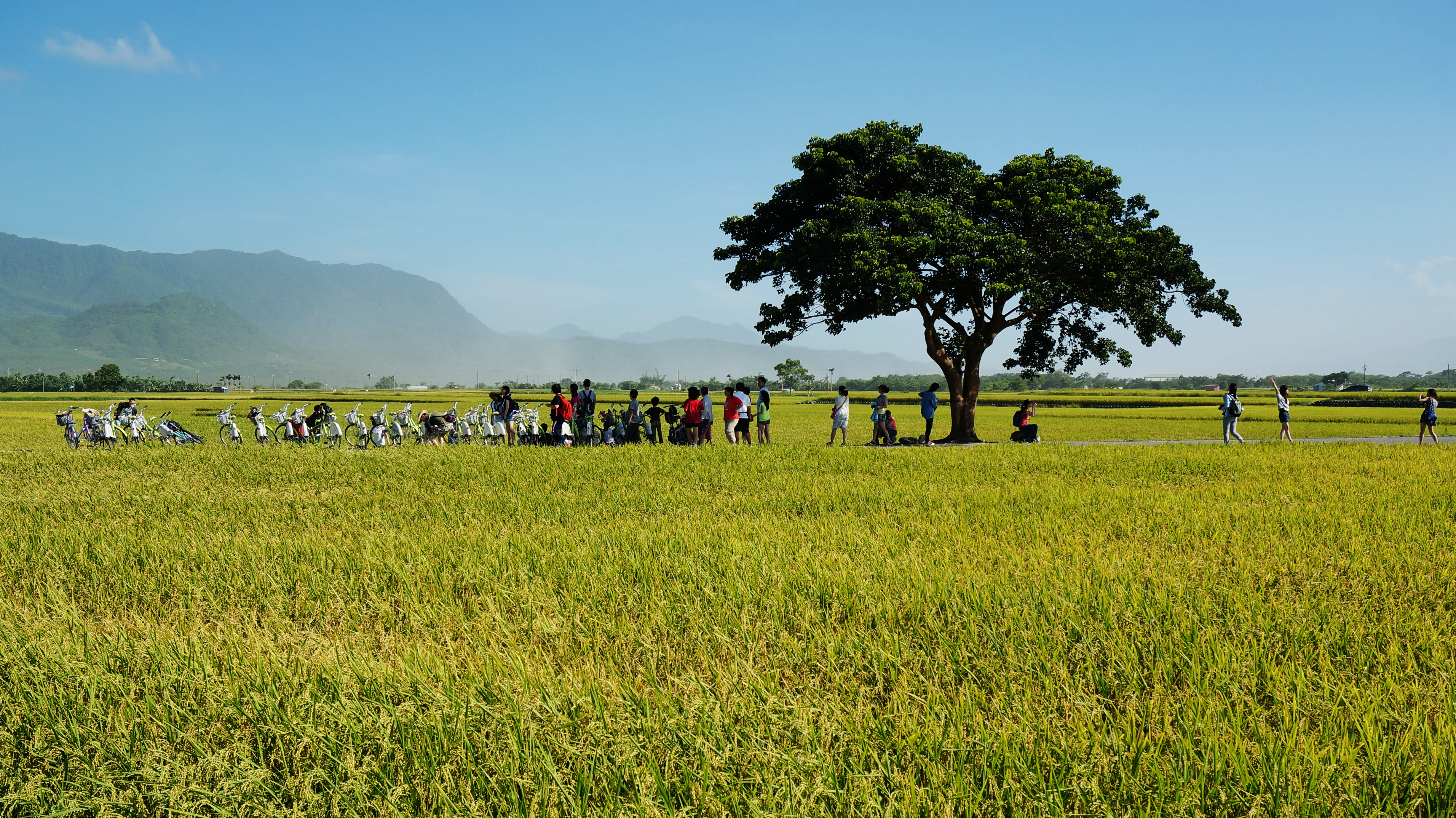 臺東縣池上鄉伯朗大道金城武樹。